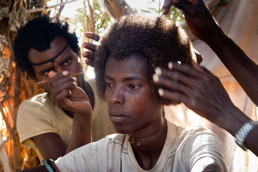 Séance de coiffure pour un jeune homme Afar This is an image of Cultural Fashion or Adornment from Ethiopia